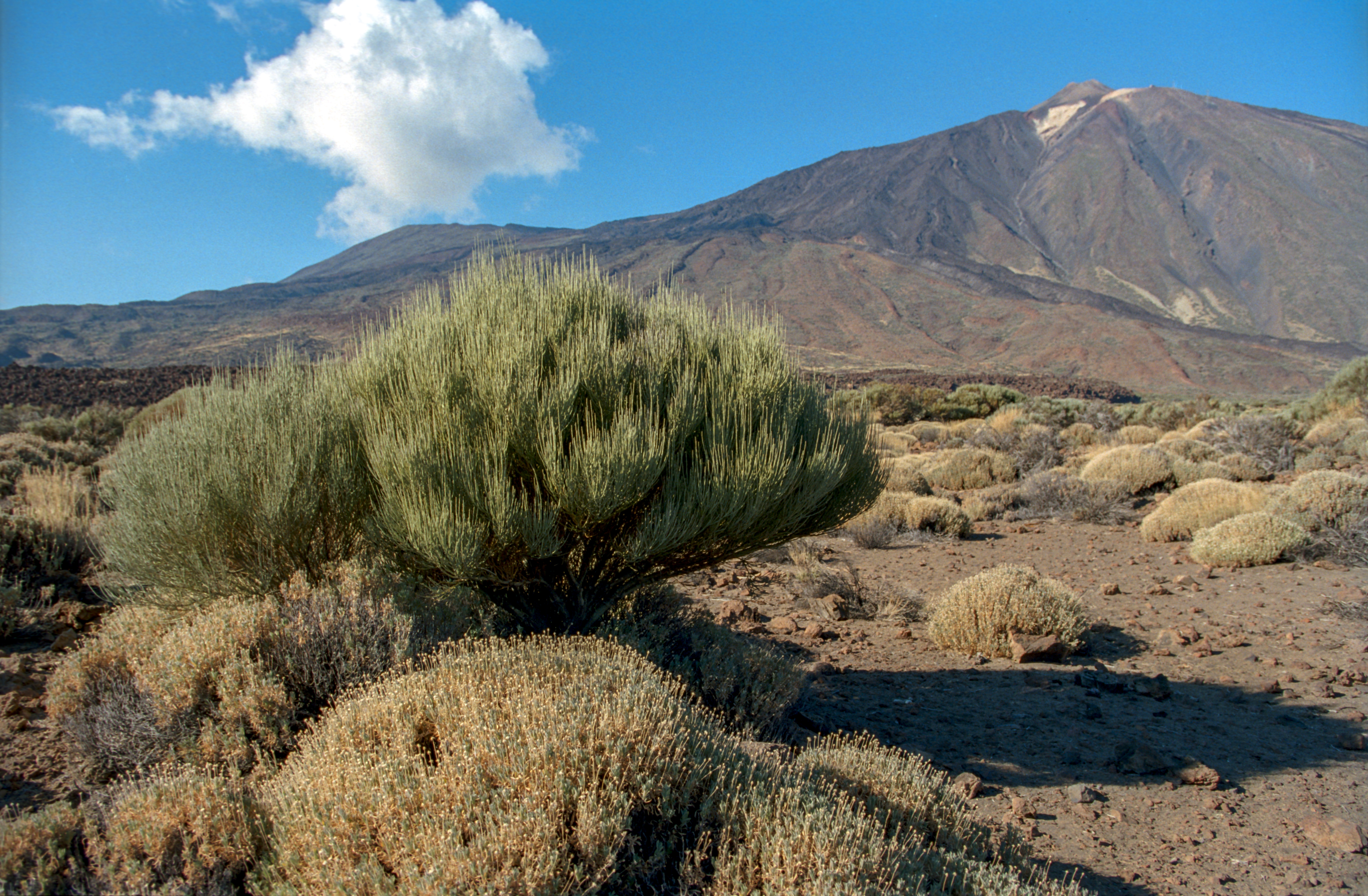 Caldera de las Cañadas, Park Narodowy Pico del Teide (Teneryfa)